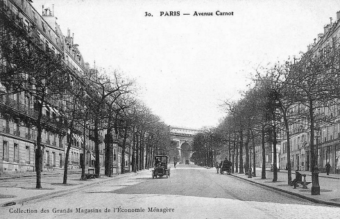 avenue Carnot paris 17ème vers 1900